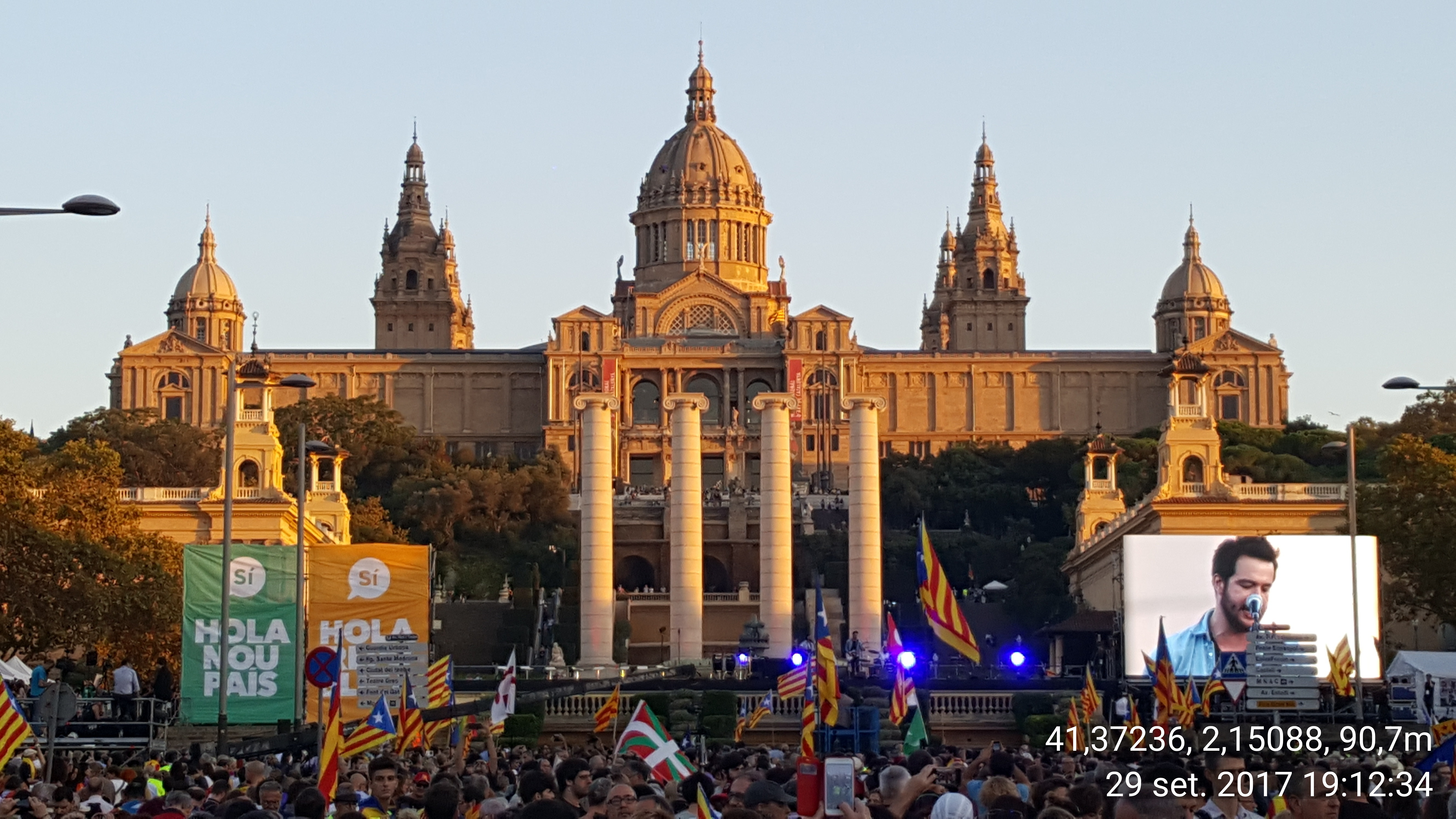 Referèndum d'Autodeterminació de Catalunya: inici acte final campanya 1-O a l'Avinguda de la Reina Maria Cristina de Barcelona. Wikipedia: Catalan independence referendum, 2017 See also category: Catalan independence referendum, 2017.